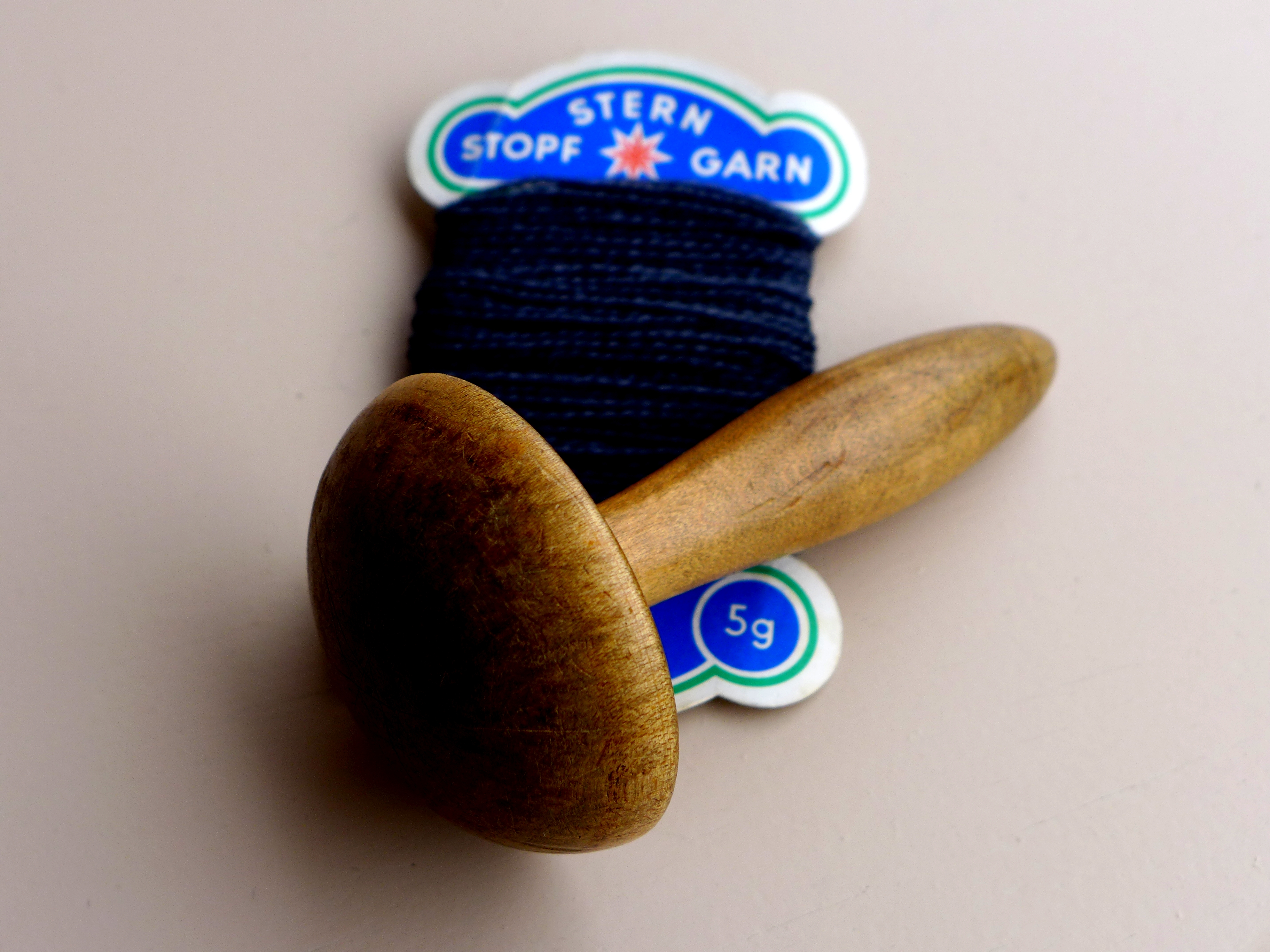 Ein hölzener Stopfpilz aus deutscher Produktion in den 1950er Jahren mit einer Karte Stern-Stopfgarn.